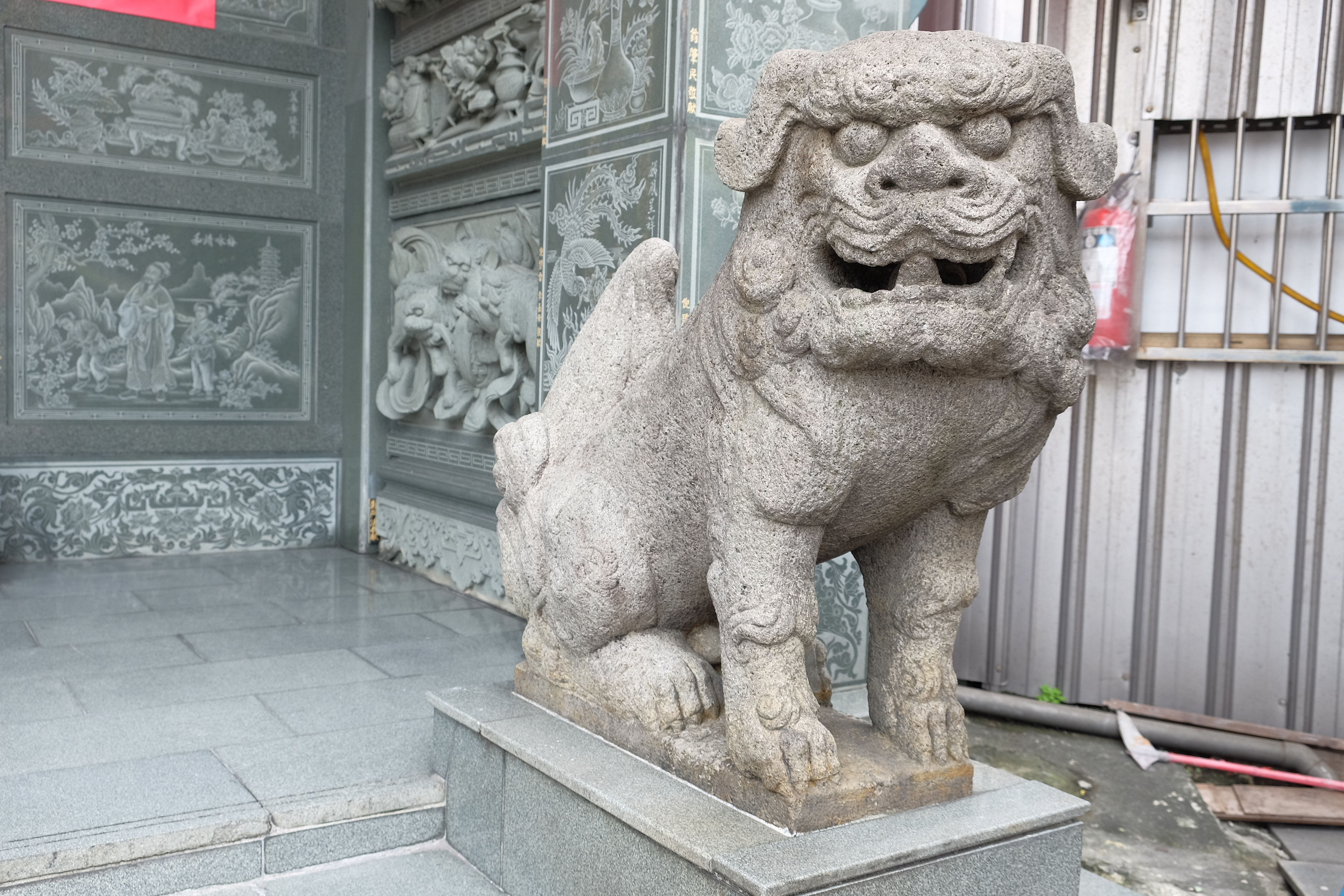 中文（台灣）: 2018 Ruifang Shrine Komainu阿形 瑞芳龍巖宮前